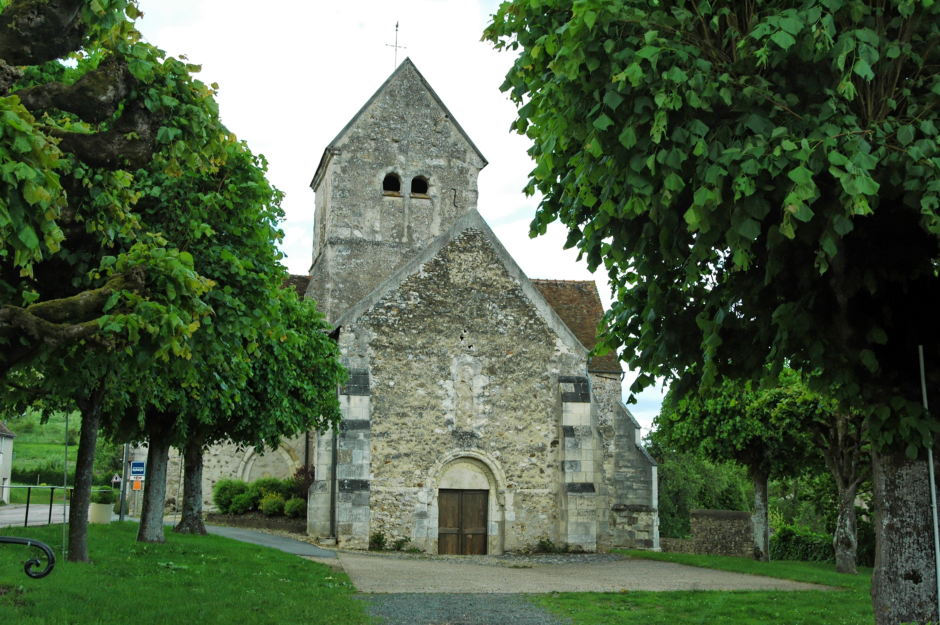 Église Saint-Caprais de Chartèves.